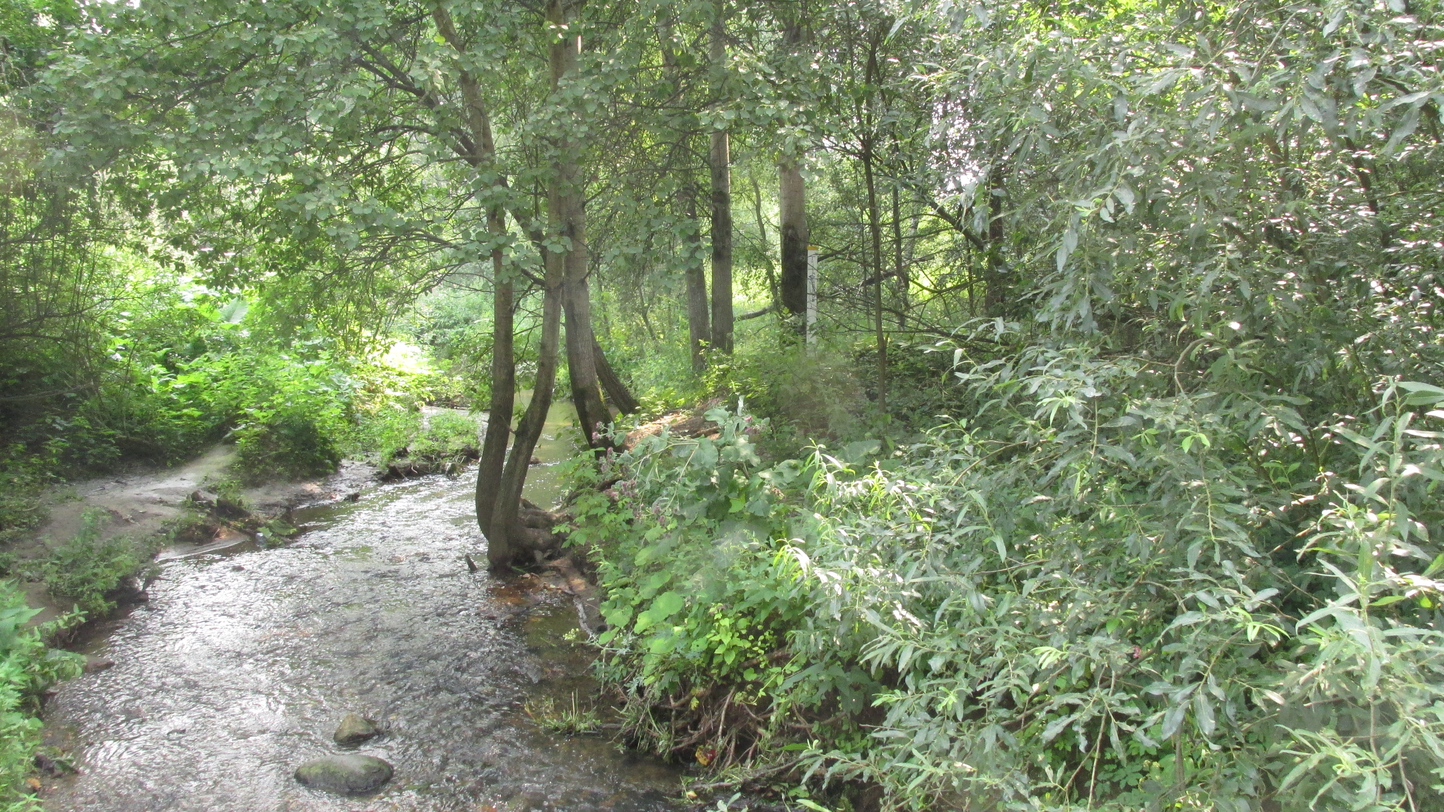 В районе Кожухово.